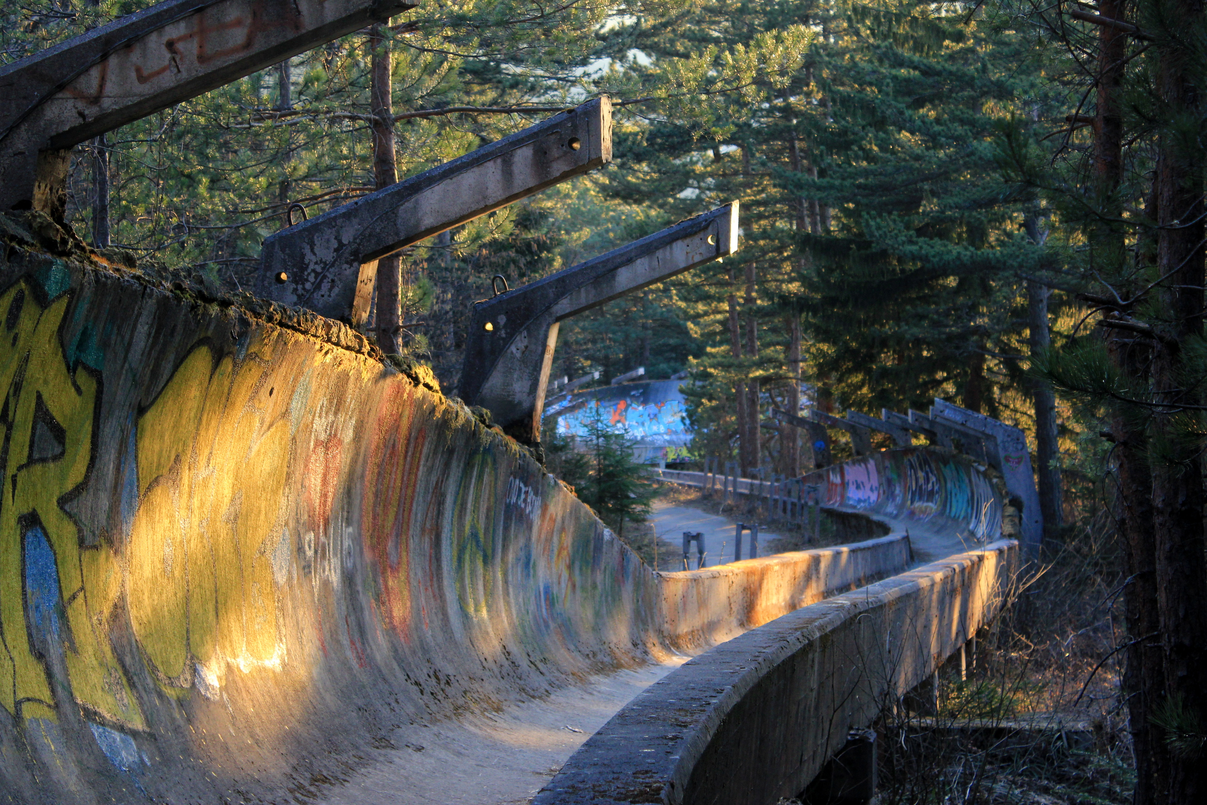 Abends an der Olympischen Bobbahn oberhalb von Sarajevo.